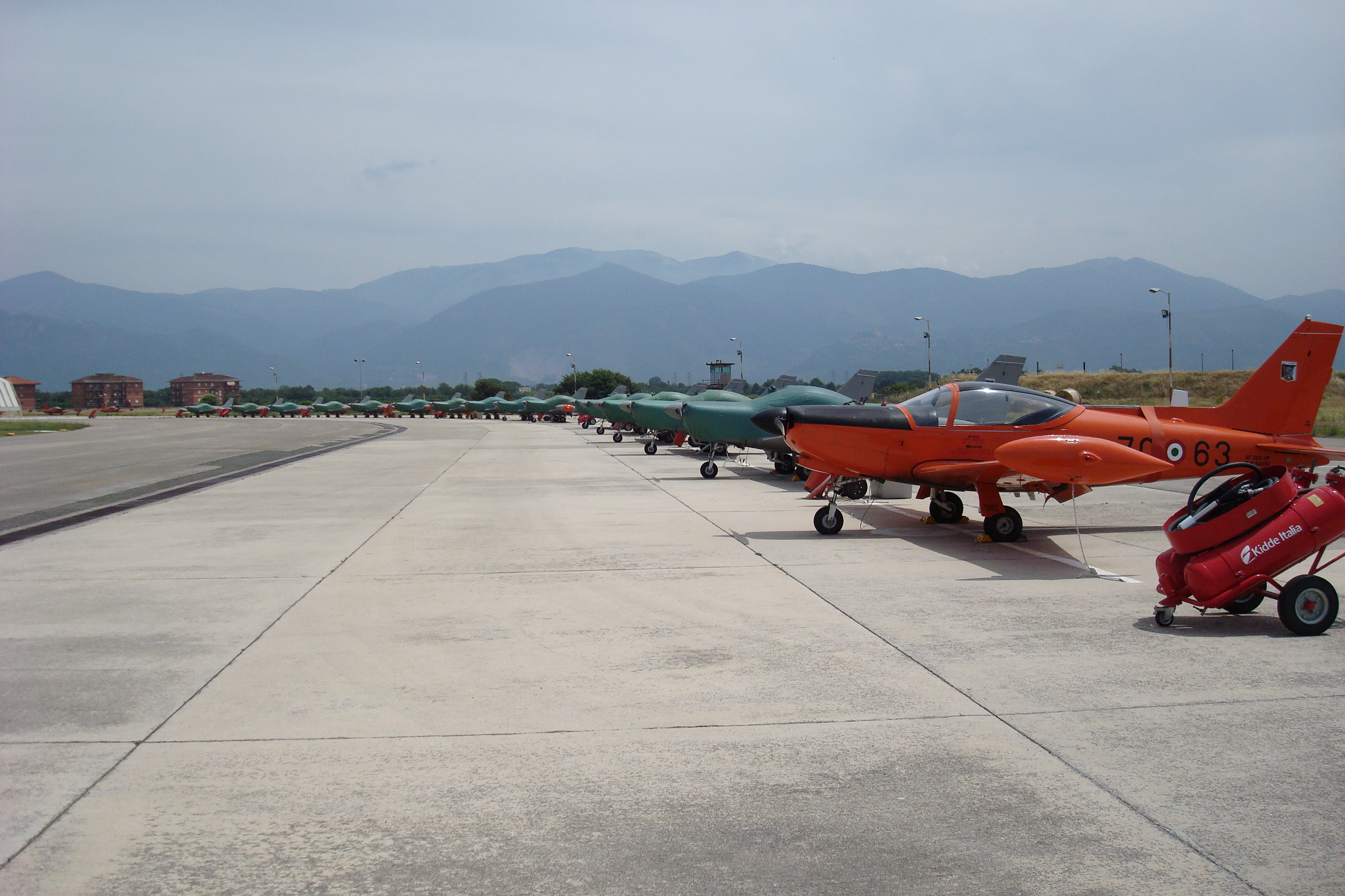 Foto della linea volo del 70º Stormo dell'Aeronautica Militare.